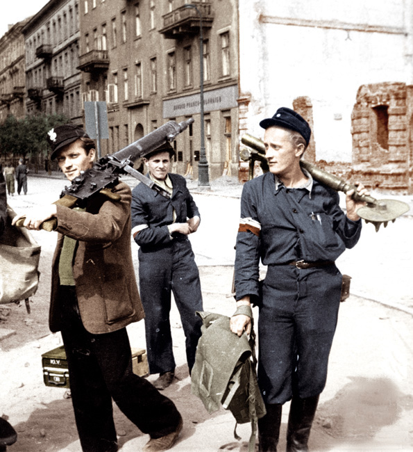 Powstanie warszawskie: Powstańcy ze zdobyczną bronią po zdobyciu Komendy Policji na Krakowskim Przedmieściu. Ul. Czackiego, róg Świętokrzyskiej. 23 sierpnia 1944. Kadr z pokolorowanego filmu "Powstanie Warszawskie". Photo was colorized.